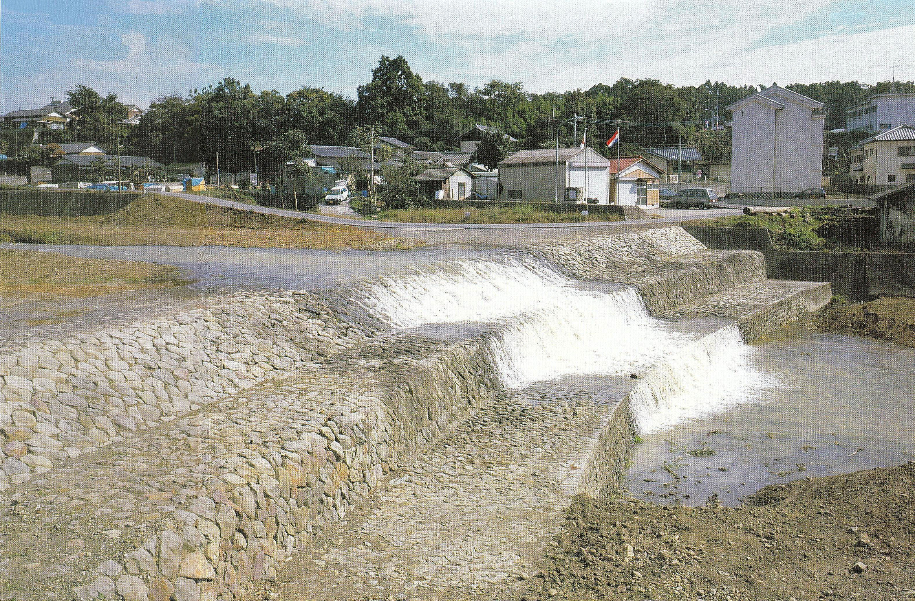 The Otani River Anti-Erosion Dam in Mima-shi, Tokushima-ken, Japan